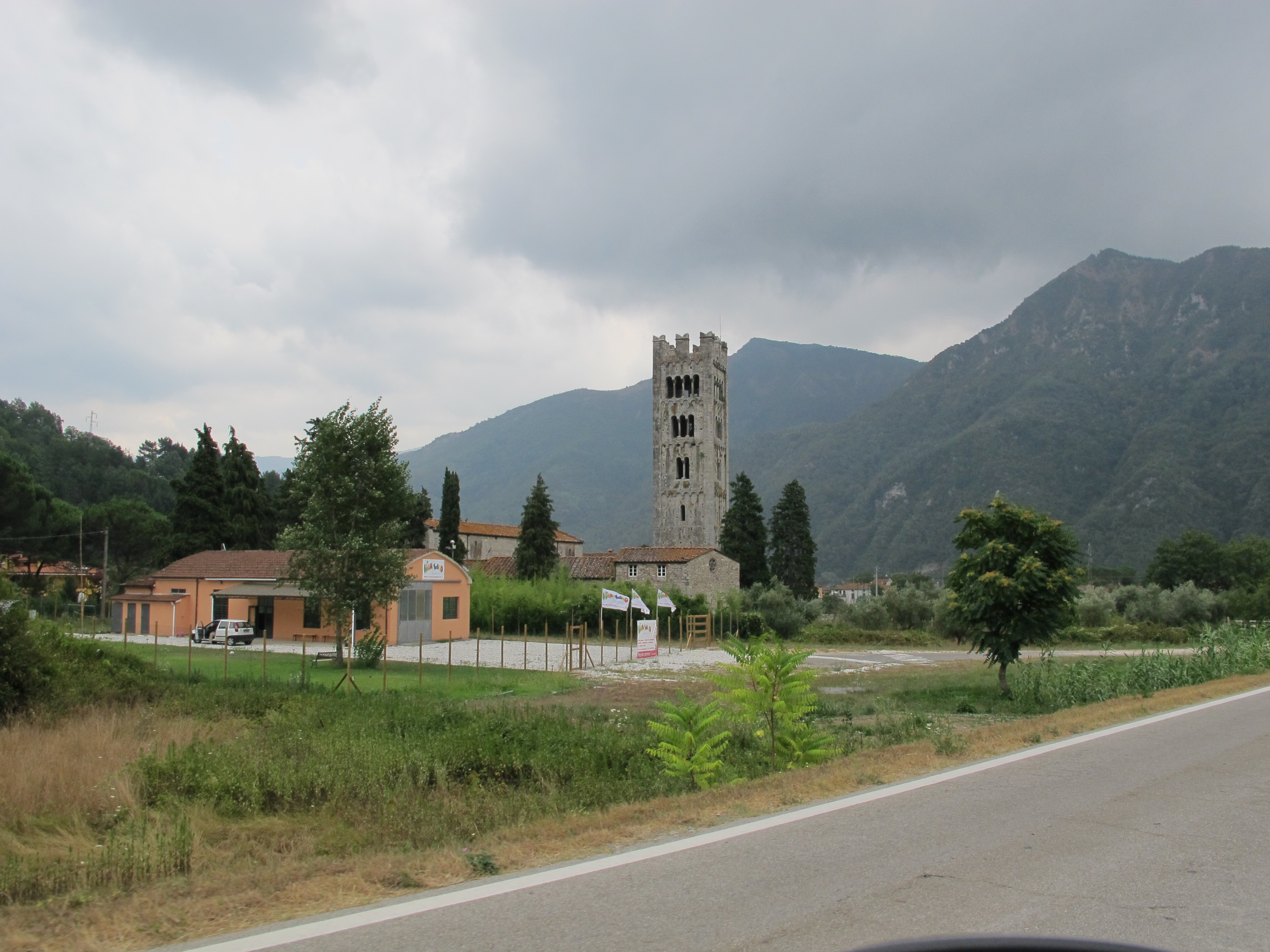 Pieve di santa maria a diecimo